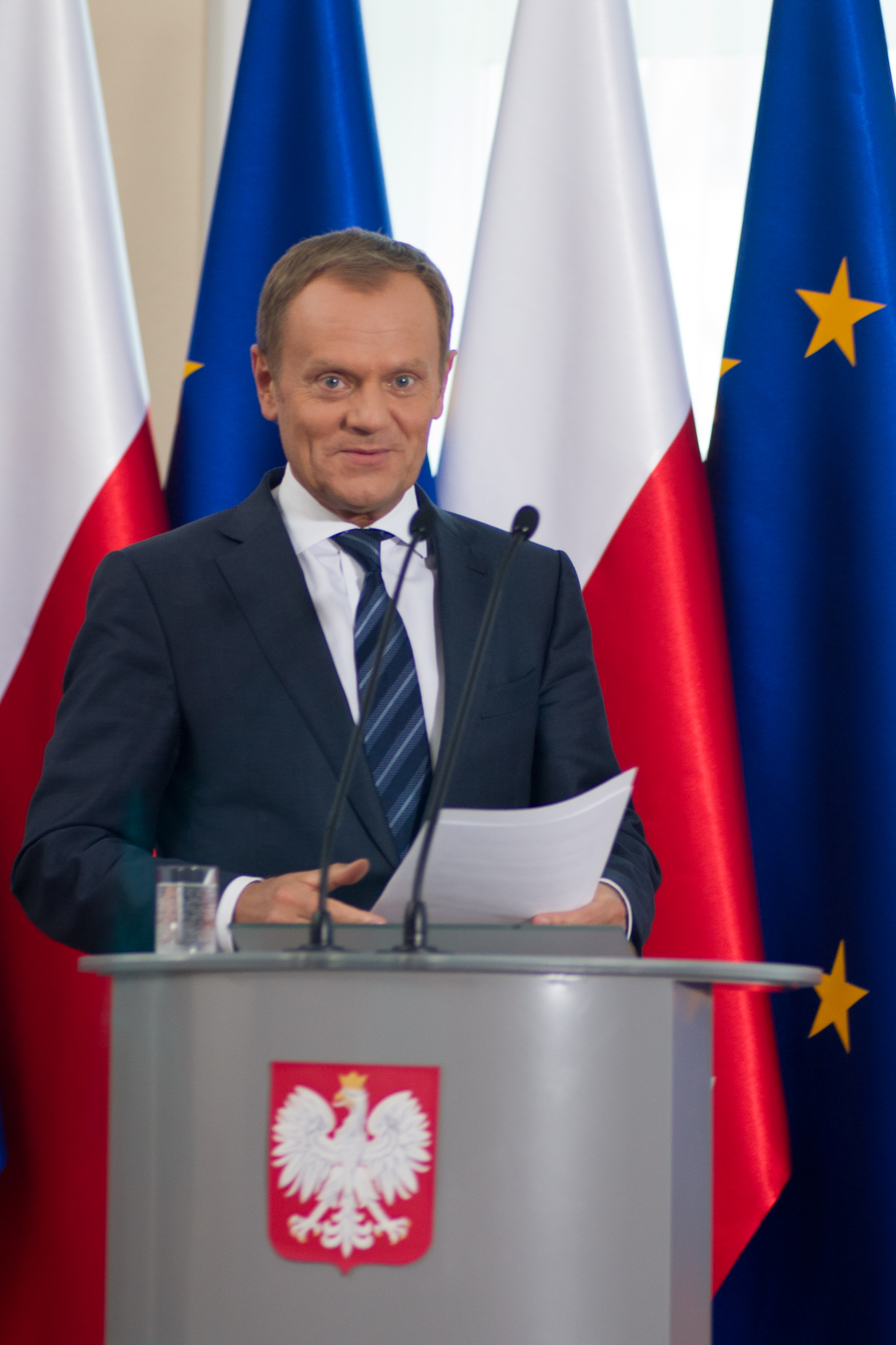 Donald Tusk, 2014, Kancelaria Prezesa Rady Ministrów, Warszawa